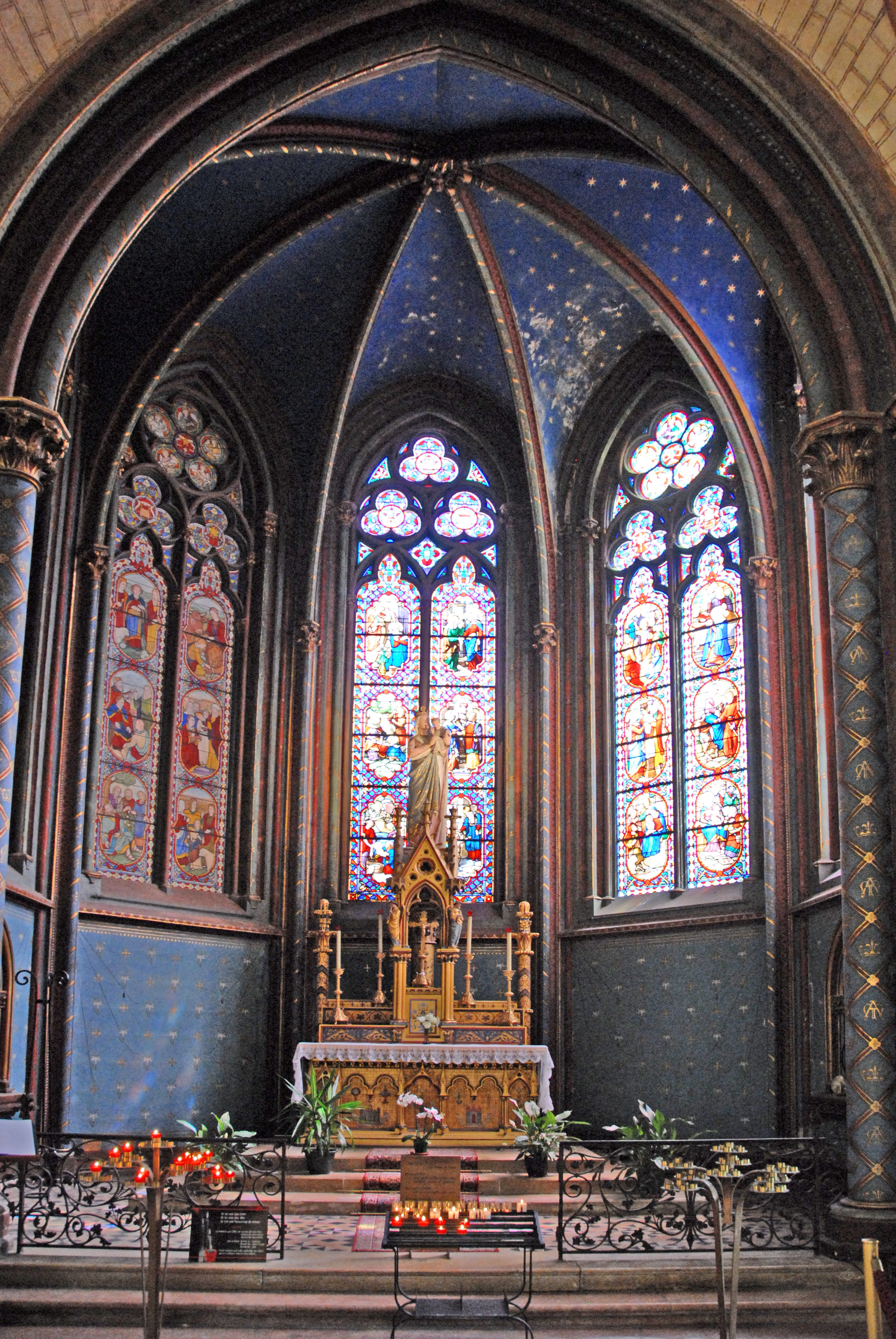 St-Bénigne, Chorapsis